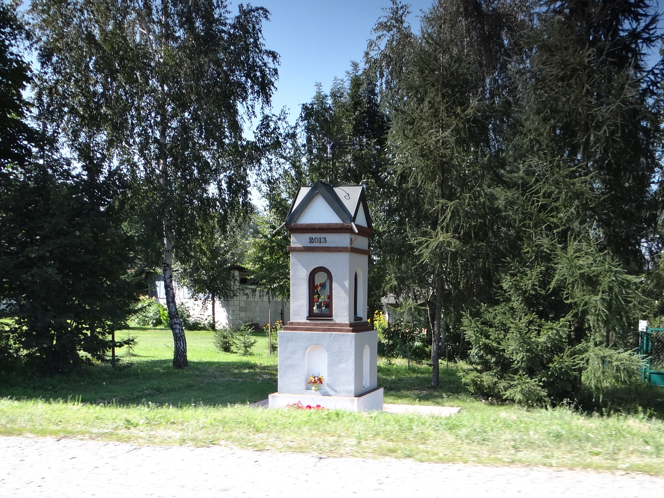 Kapliczka z figurą Matki Bożej z 2013 roku